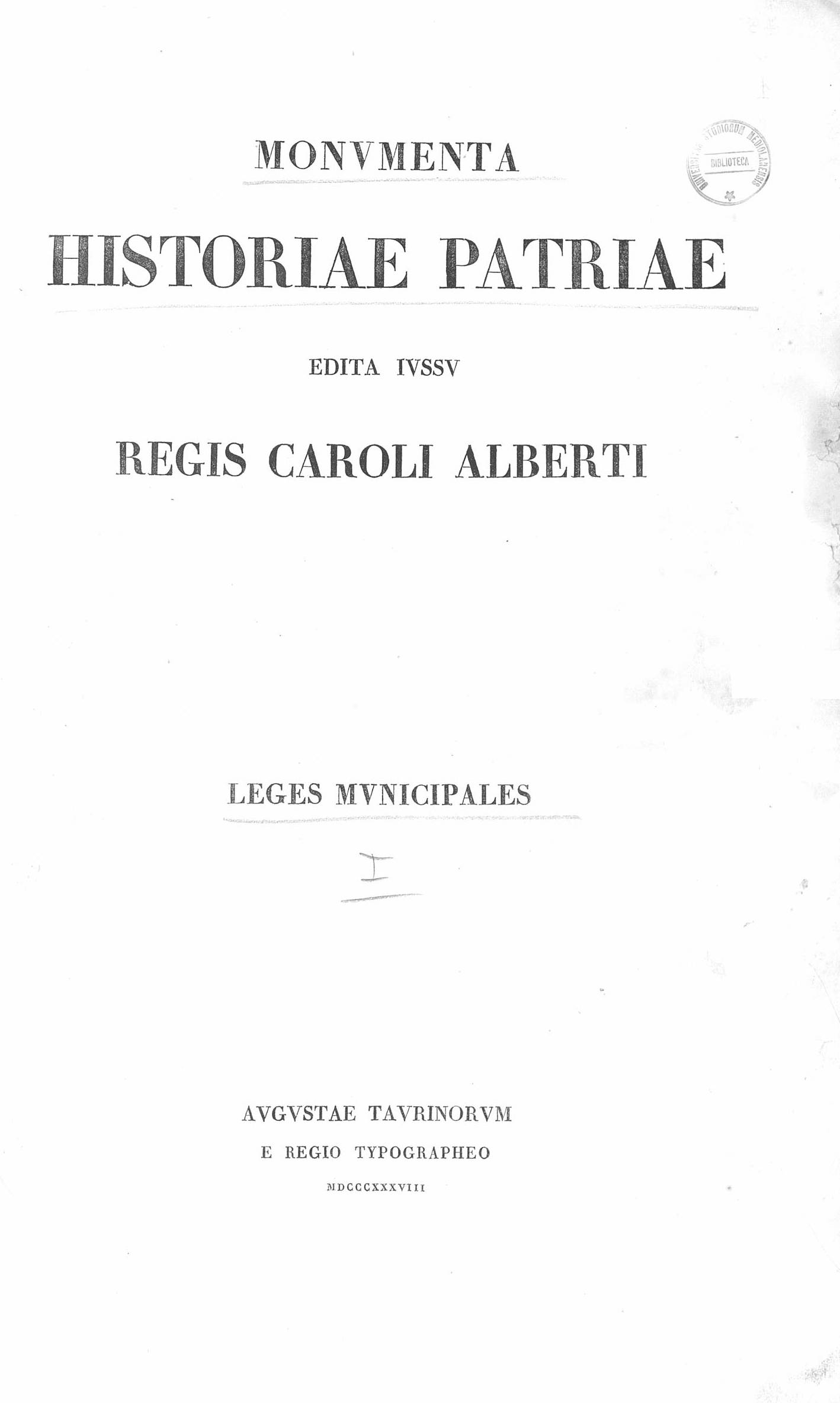 Frontespizio